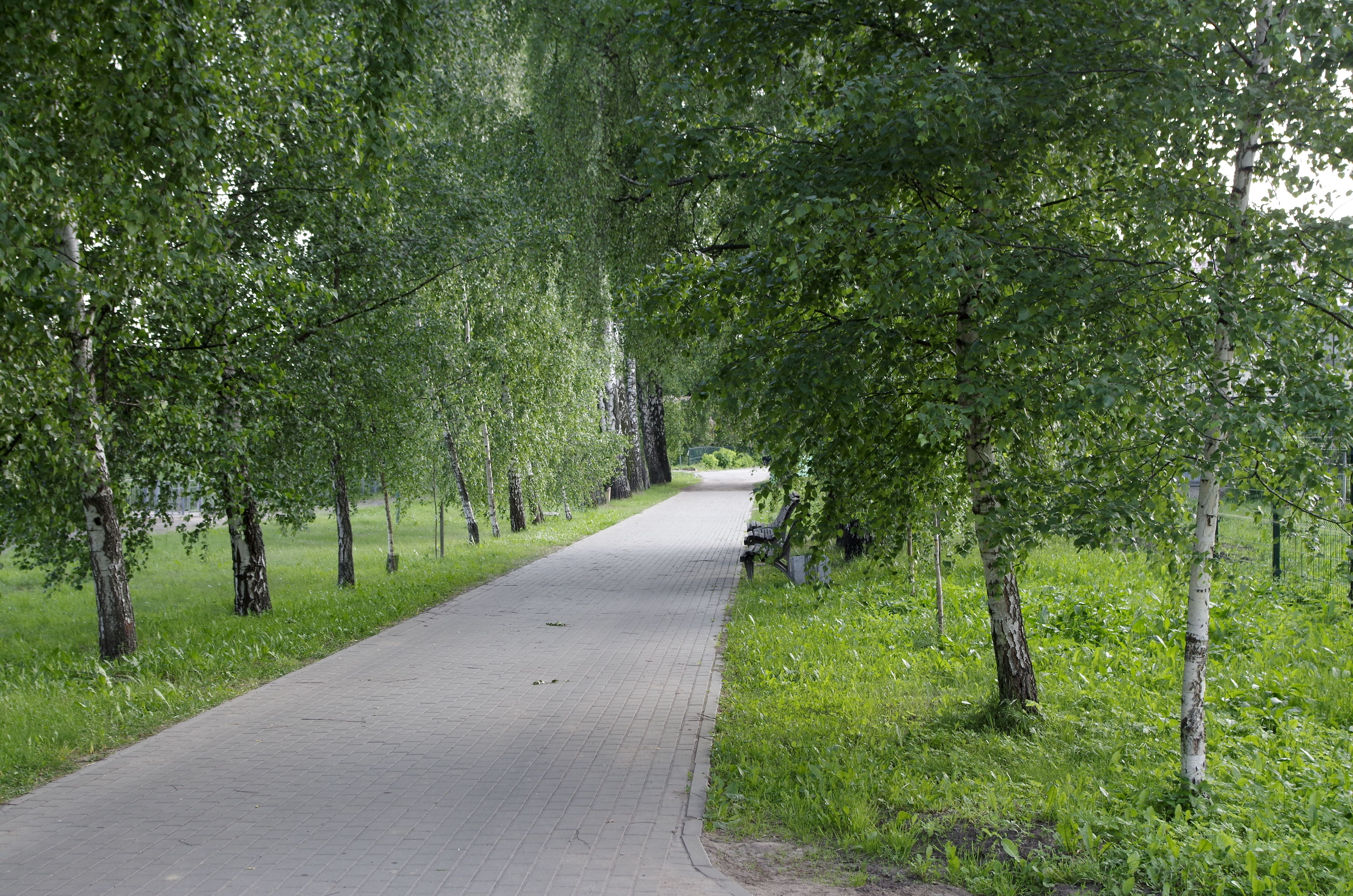 ЦБС. Алея бярозы павіслай